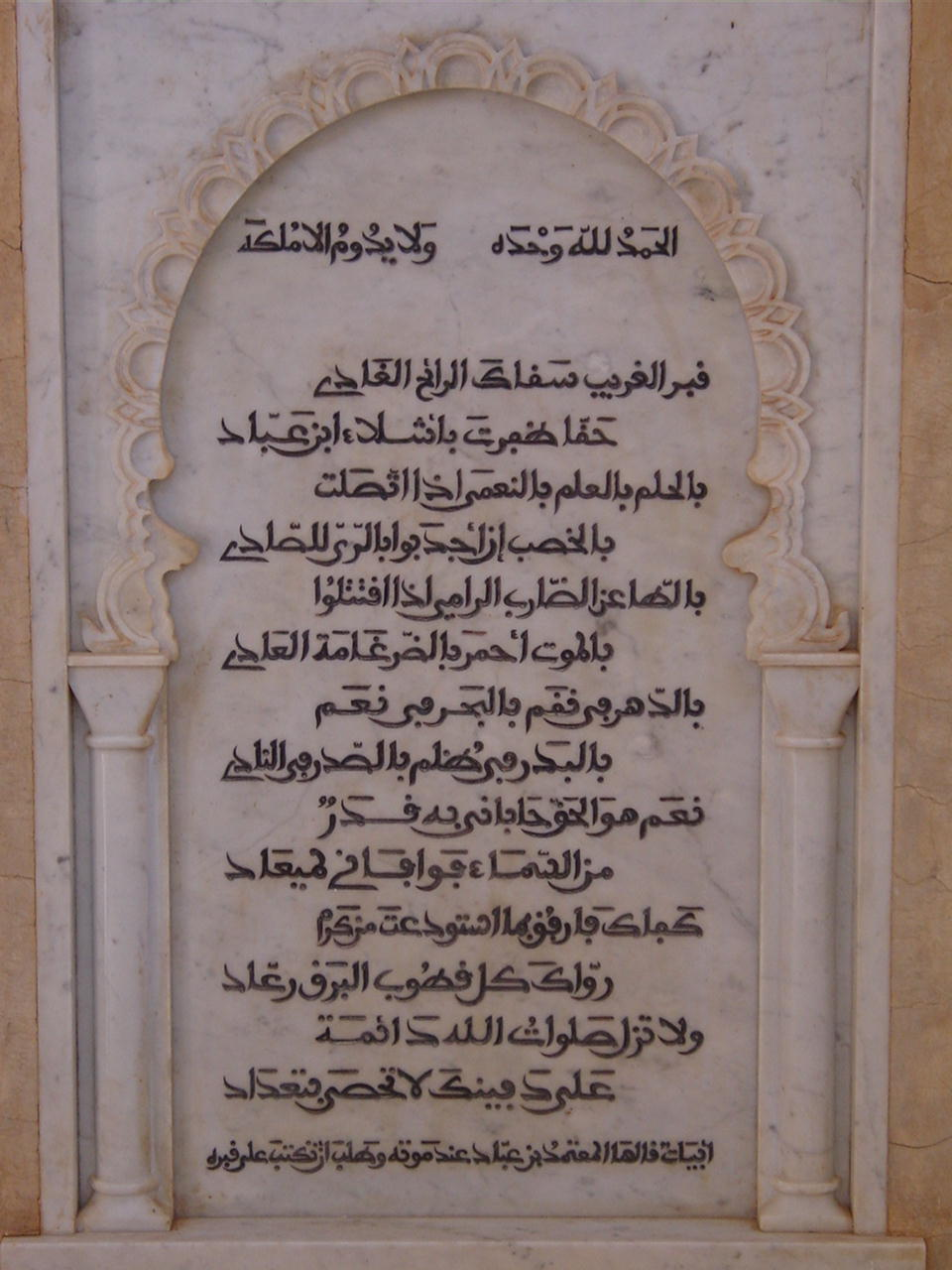 Aghmat - Túmulo do poeta português (nascido em Beja) Al-Mu’tamid. O rei poeta Al-Mu’tamid, filho e sucessor do rei de Sevilha foi nomeado governador de Silves com apenas 12 anos. Al-Mu’tamid, como é sabido, depois de ter sido derrotado e destronado, em 1091 (484 H.), após a queda de Sevilha, foi desterrado para Aghmat povoação ao sul de Marrquexe. Aqui morreu está enterrado. O poema traduzido: ...regue-te o chuvisco vespertino e matinal... antes de olhar este esquife mal sabia eu que altas montanhas sobre tábuas repousaram que as taciturnas nuvens te reguem entre raios e trovões sobre esta lage tão larga. Aghmat - Tomb of the Portuguese poet (born in Beja) Al-Mu' tamid. The king Al-Mu' tamid, son and successor of the king of Seville was nominated governor of Silves (Portugal) with only 12 years. Al-Mu' tamid, after having been defeated, in 1091 (484 H.), after the fall of Seville, was exiled for Aghmat at the south of Marraquexe. Here he died. Please someone translate the poem